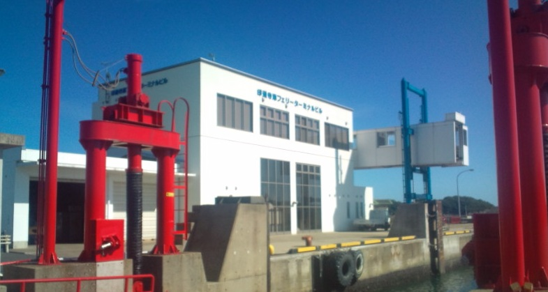 印通寺港 （長崎県壱岐市石田町）